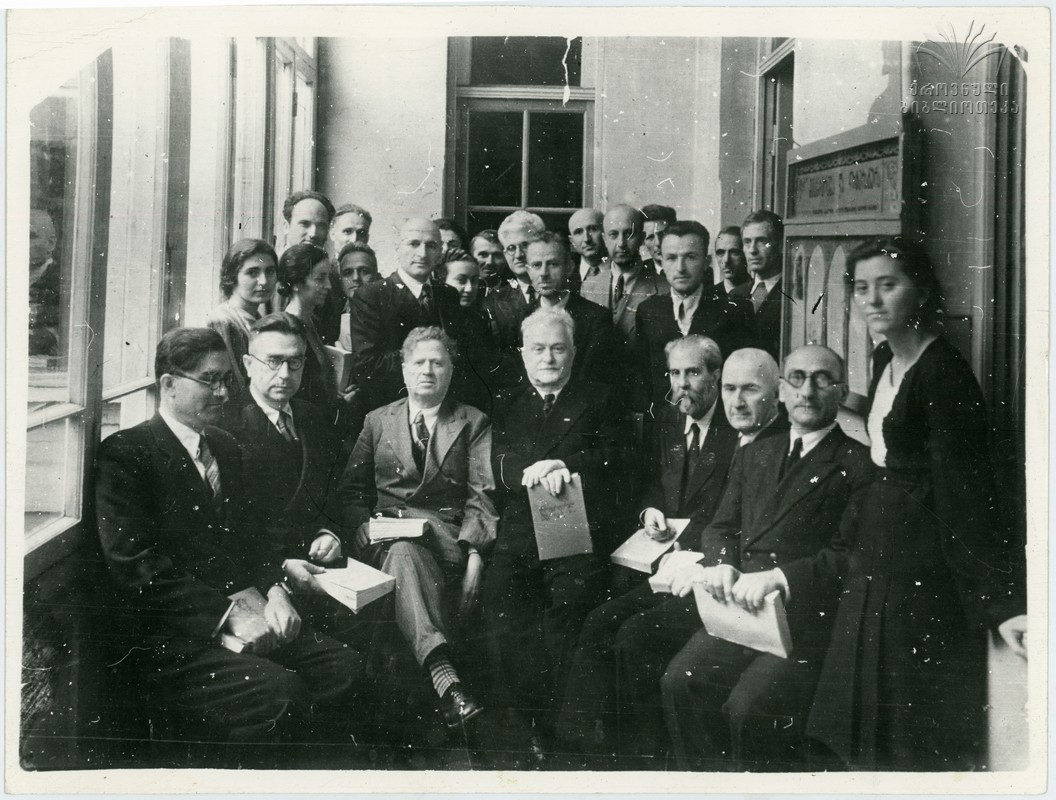 Фотография сделана после конференции в здании Академии наук в Тбилиси. Первый ряд, слева-направо: Александр Барамидзе, С. Джанашия, Акакий Шанидзе, Корнелий Кекелидзе, Гр. Чубинашвили, Дмитрий Узнадзе, Л. Мелкисетбеги. Во втором ряду: Ксения Сихарулидзе, Шота Дзидзигури, Варлам Топурия, Илья Абуладзе